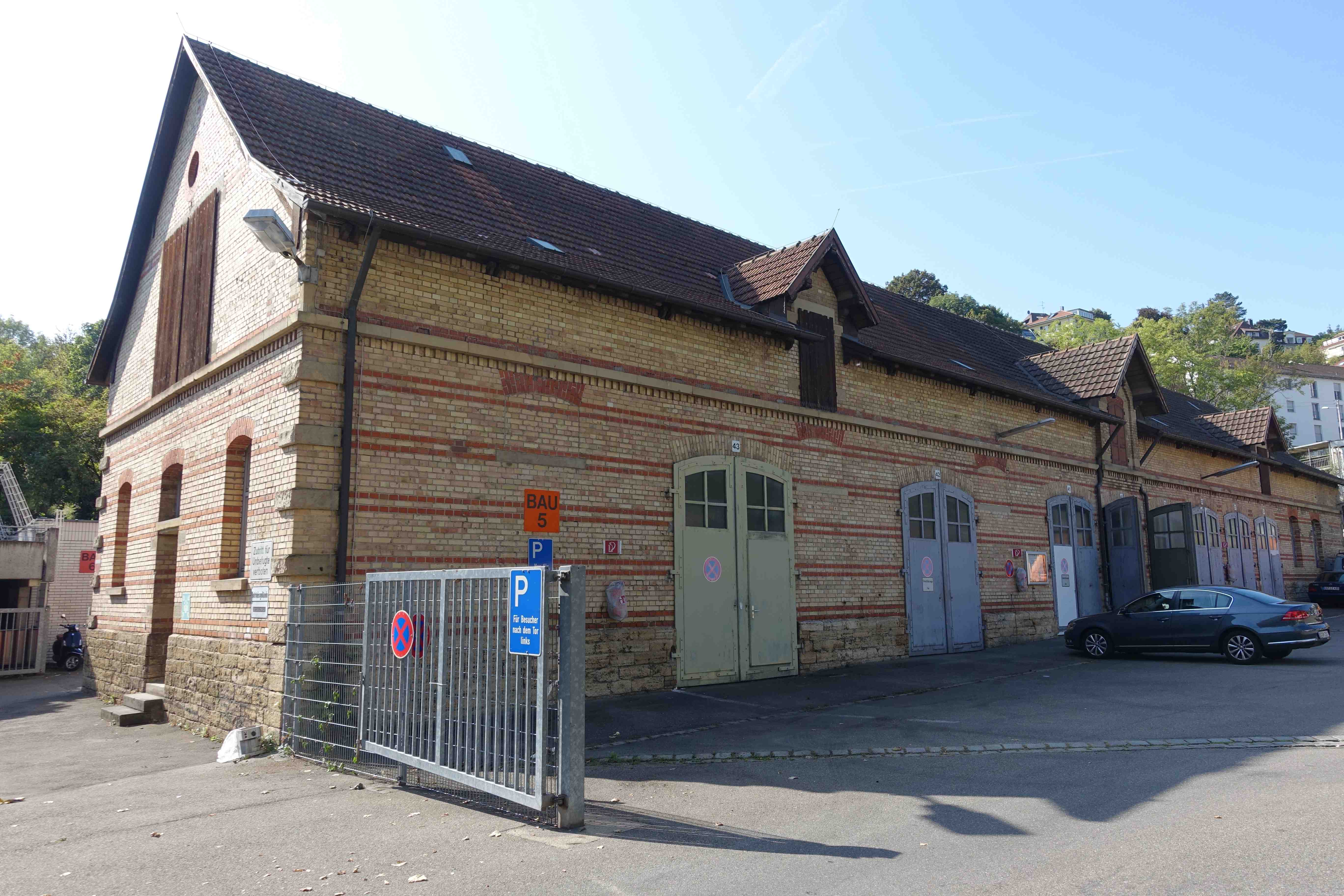 Ehemaliges Pferdestallgebäude der Latrinenanstalt Stuttgart auf dem Gelände der Abfallbeseitigung Stuttgart (AWS), Stuttgart, zwischen Mönchhaldenstraße und Türlenstraße, 2018.